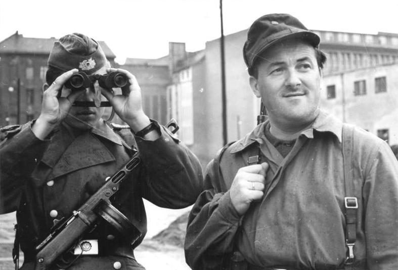 ADN-ZB-Stöhr-24.8.1961-Berlin: Kampfgruppen während ihres Einsatzes zur Durchsetzung der Grenzsicherungsmaßnahmen der DDR vom 13.8.1961. - VP-Oberwachtmeister Rudi Jass und Kämpfer Alfred Ringel auf Posten. Veröffentlichung nur mit Genehmigung der Pressestelle des MDI